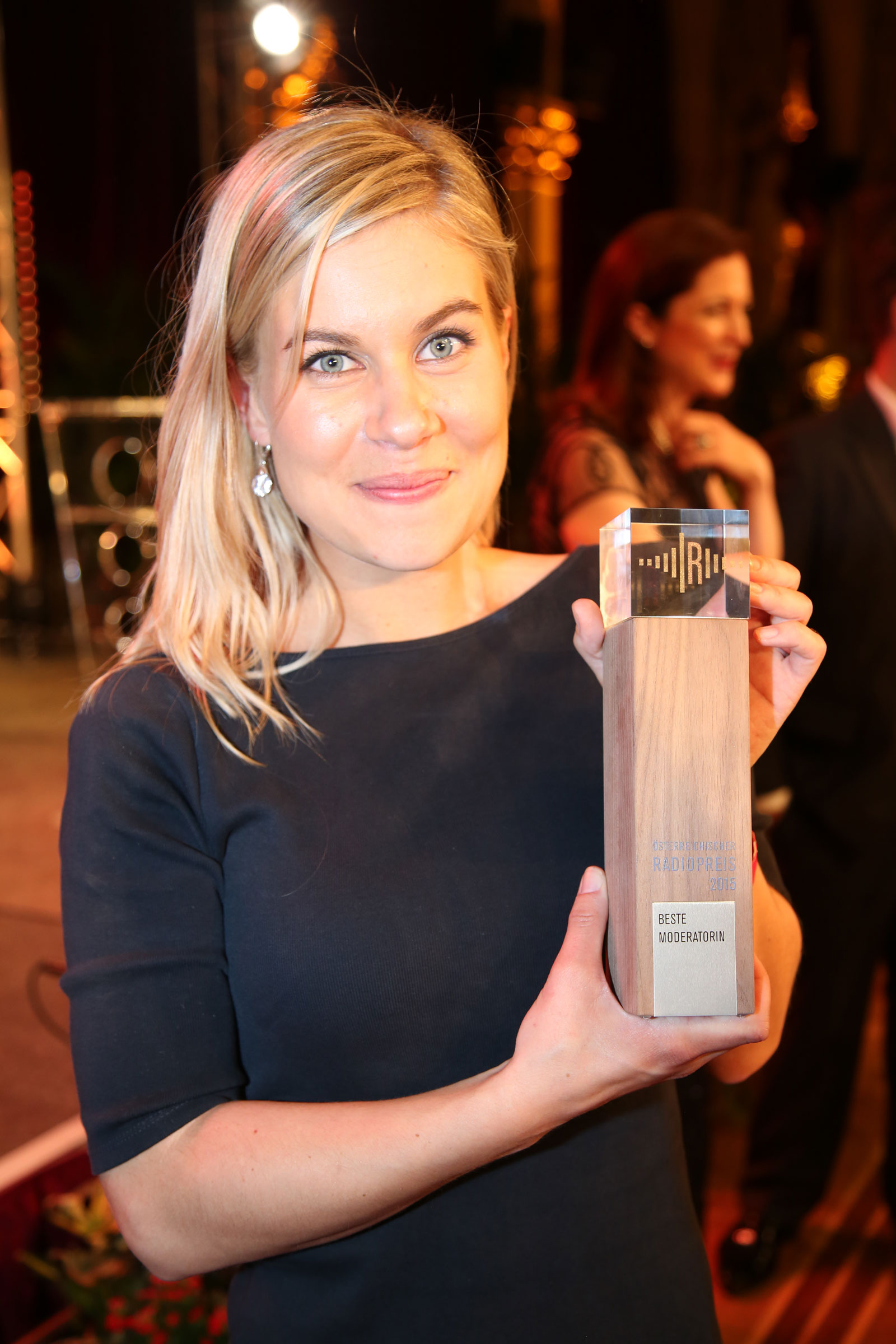 Dori Bauer, Sieger bei den Moderatorinnen-5607